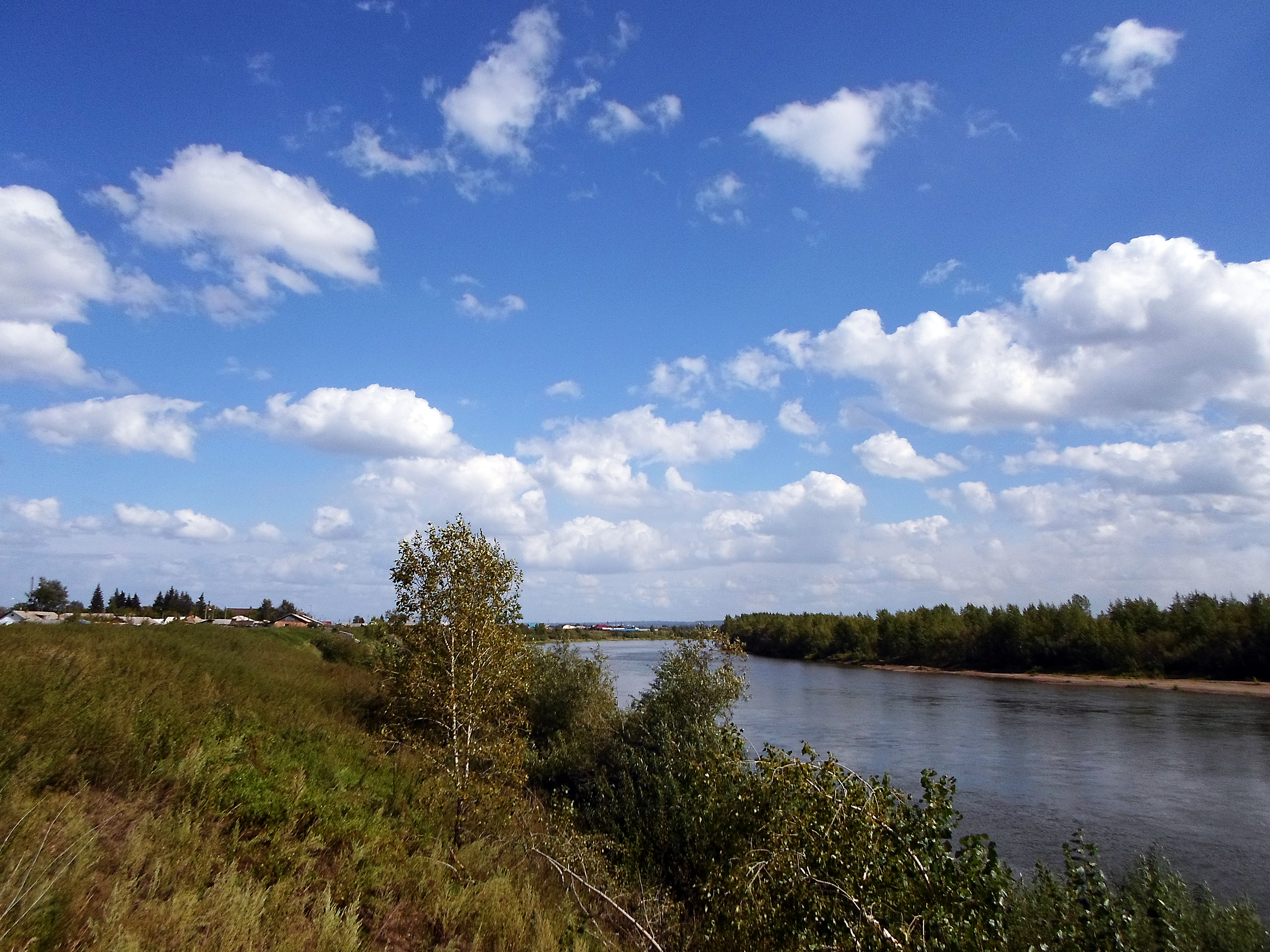 Река Чулым у села Белый Яр Ачинского района Красноярского края.